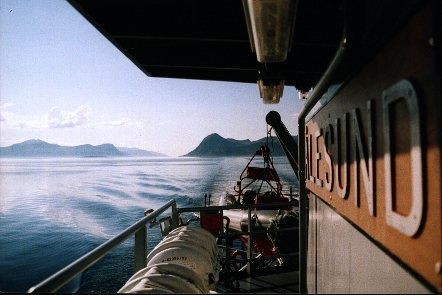 Norwegian Coastguard Vessel